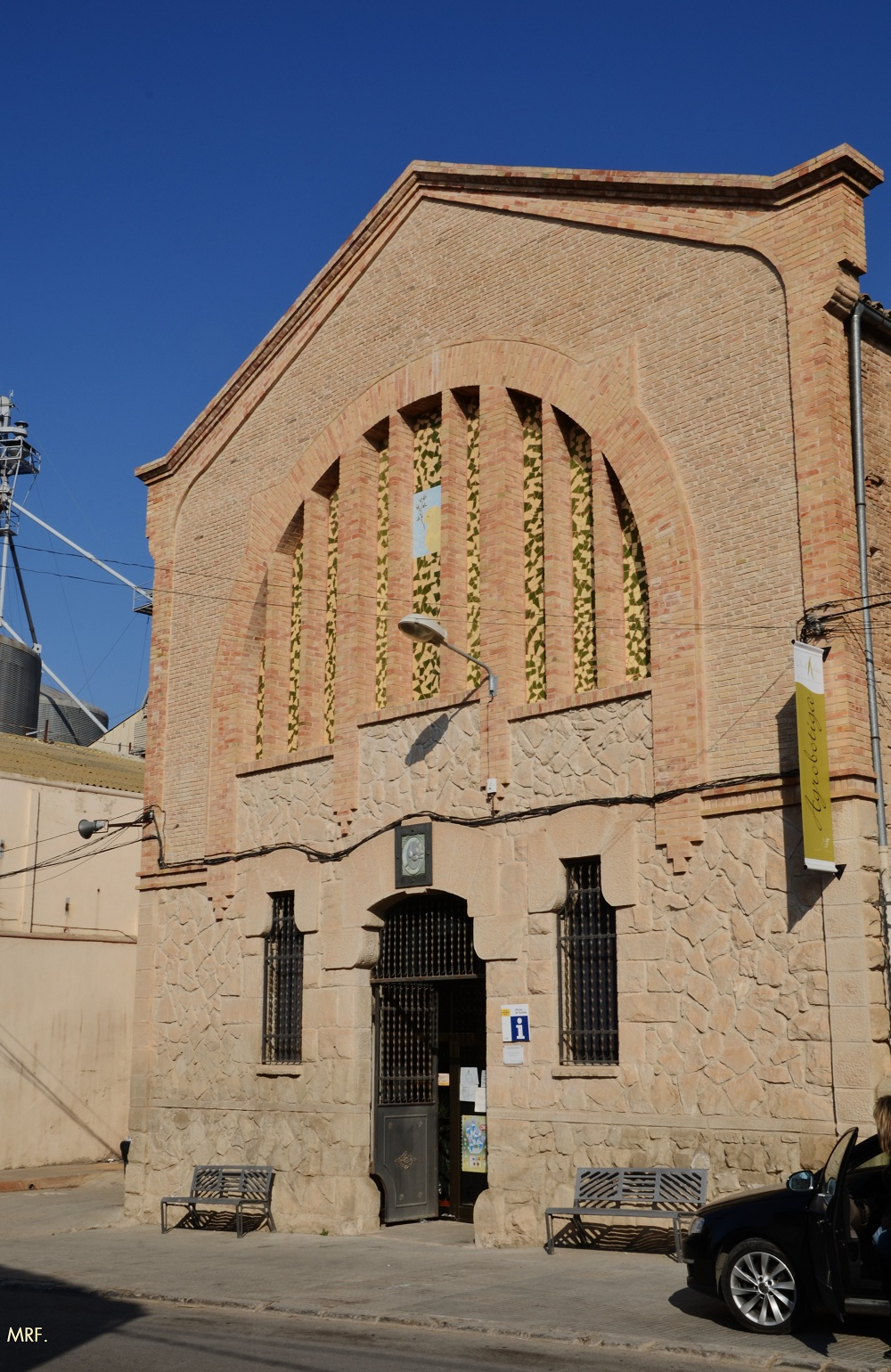 Societat Cooperativa Limitada del Camp l'Arbequina (Arbeca)